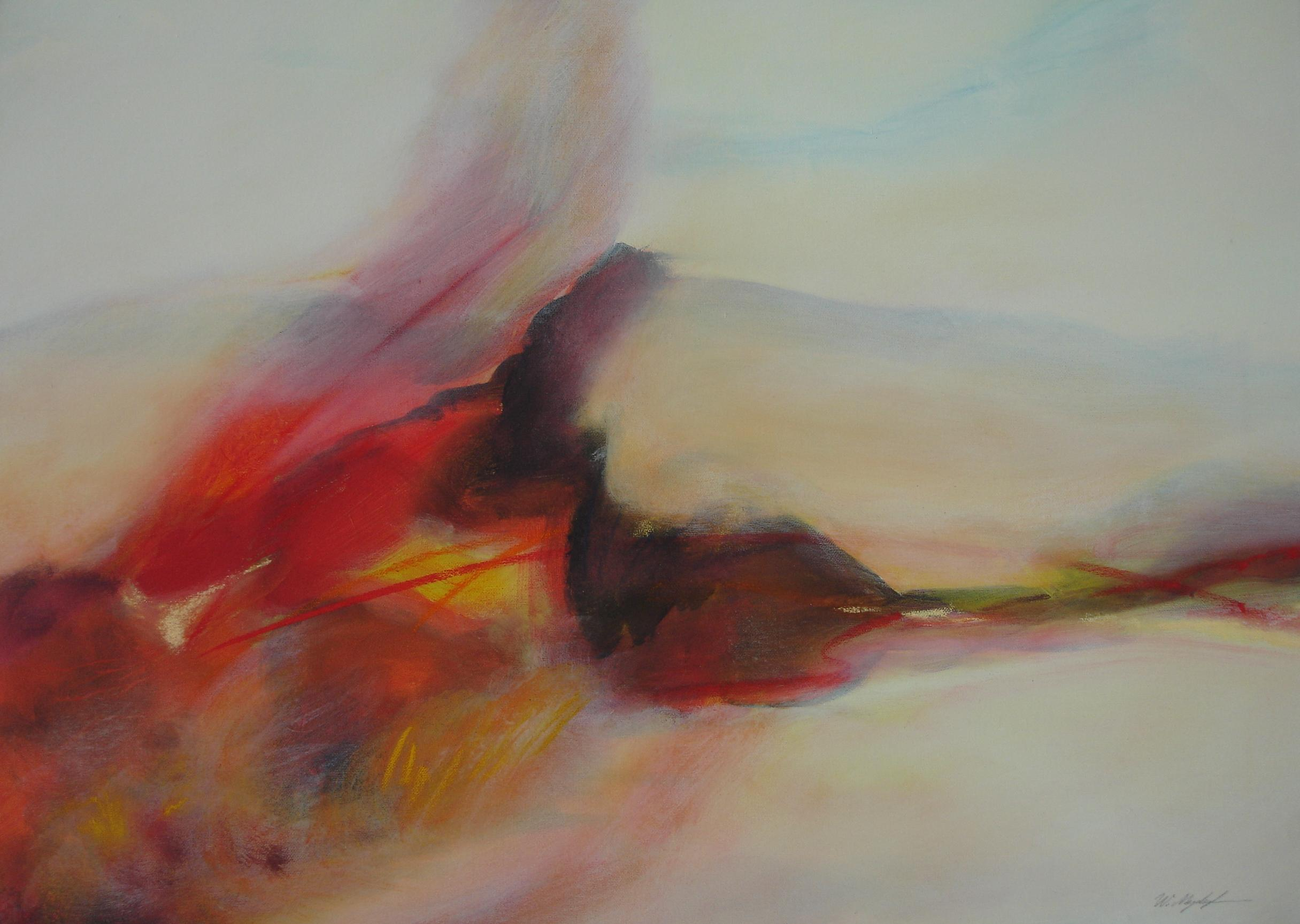 Feux aux Issambres, 2003, Acryl auf Leinwand 70 x 50 cm